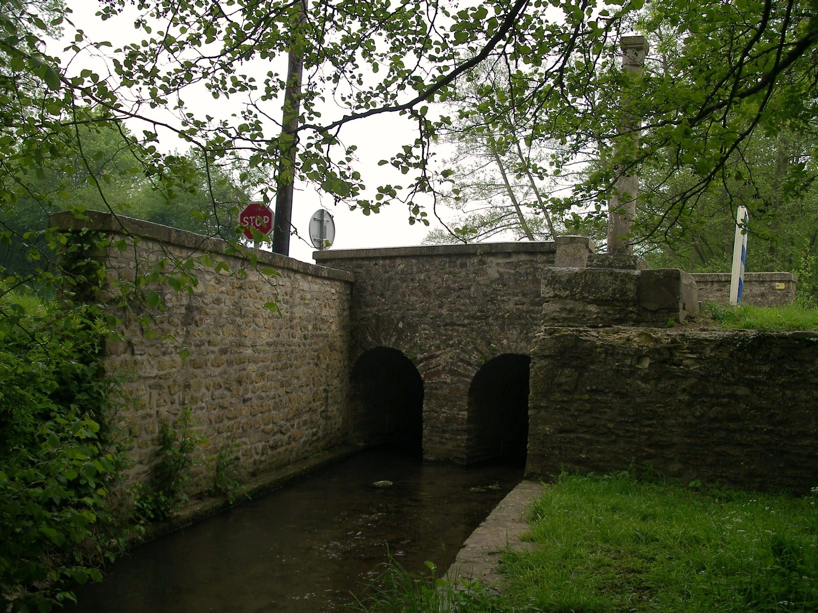 Le Pont du Bactot sur la Laize à Moulines (Calvados)